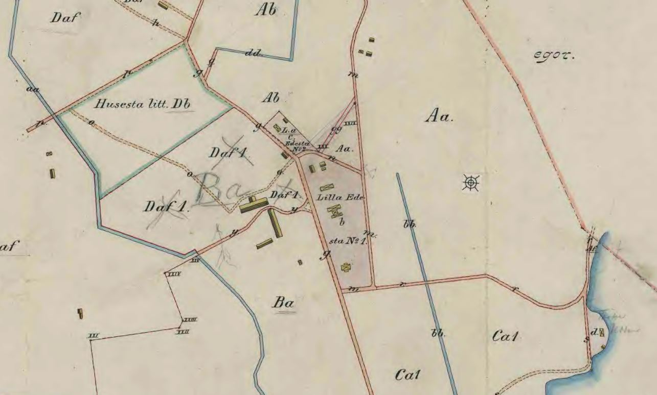 Del av karta över Edesta 1,2 och 3